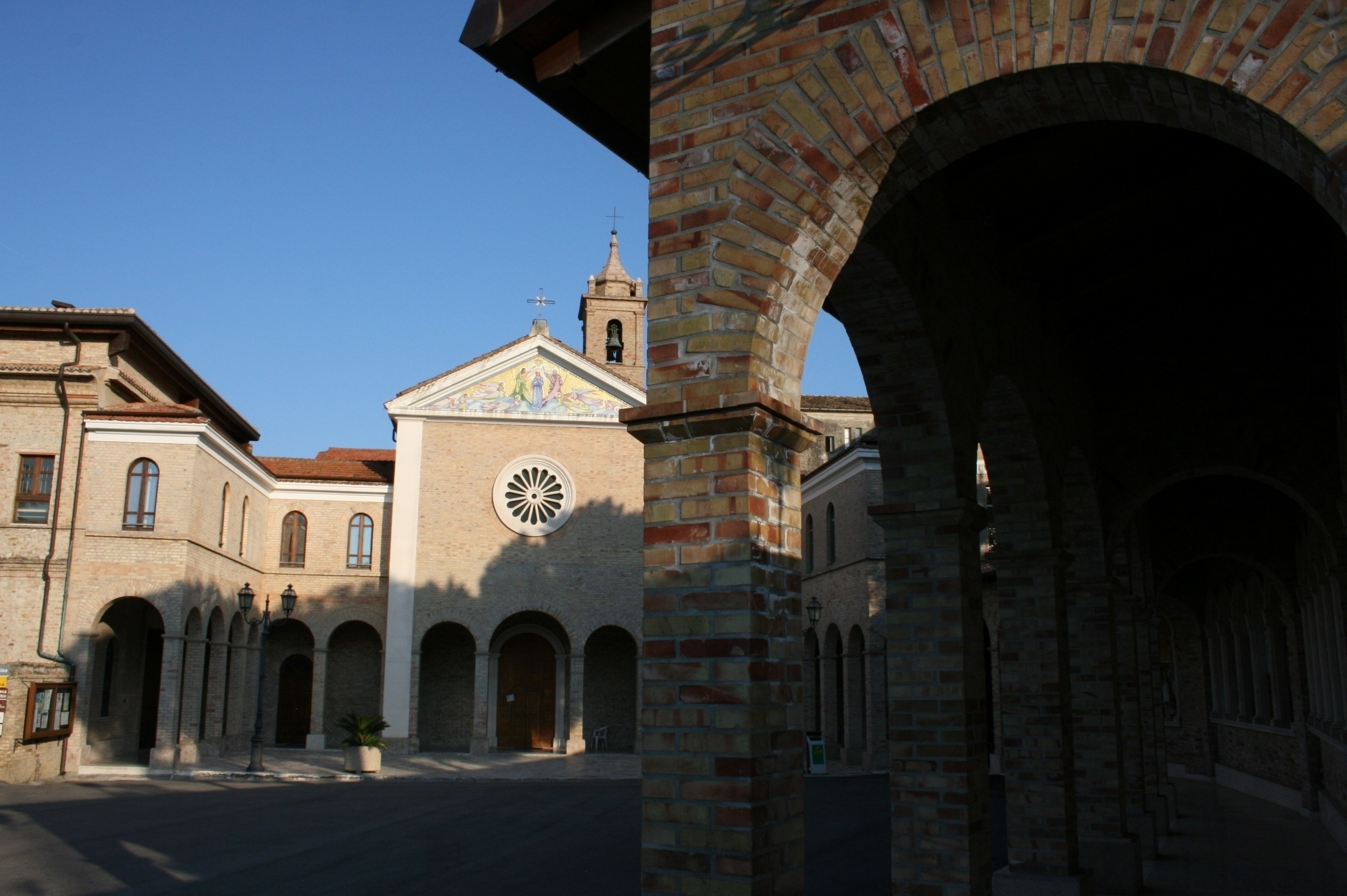 la facciata e il portico del rosario del santuario della madonna dello splendore a Giulianova-te